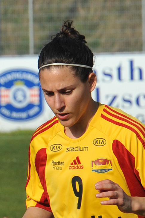 UEFA Women's Champions League 2013/14 SV Neulengbach - Tyresö FF Neulengbach, 29. März 2014 Verónica Boquete